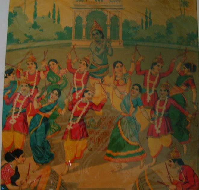 Raja Ravi Varma Lithographs Original